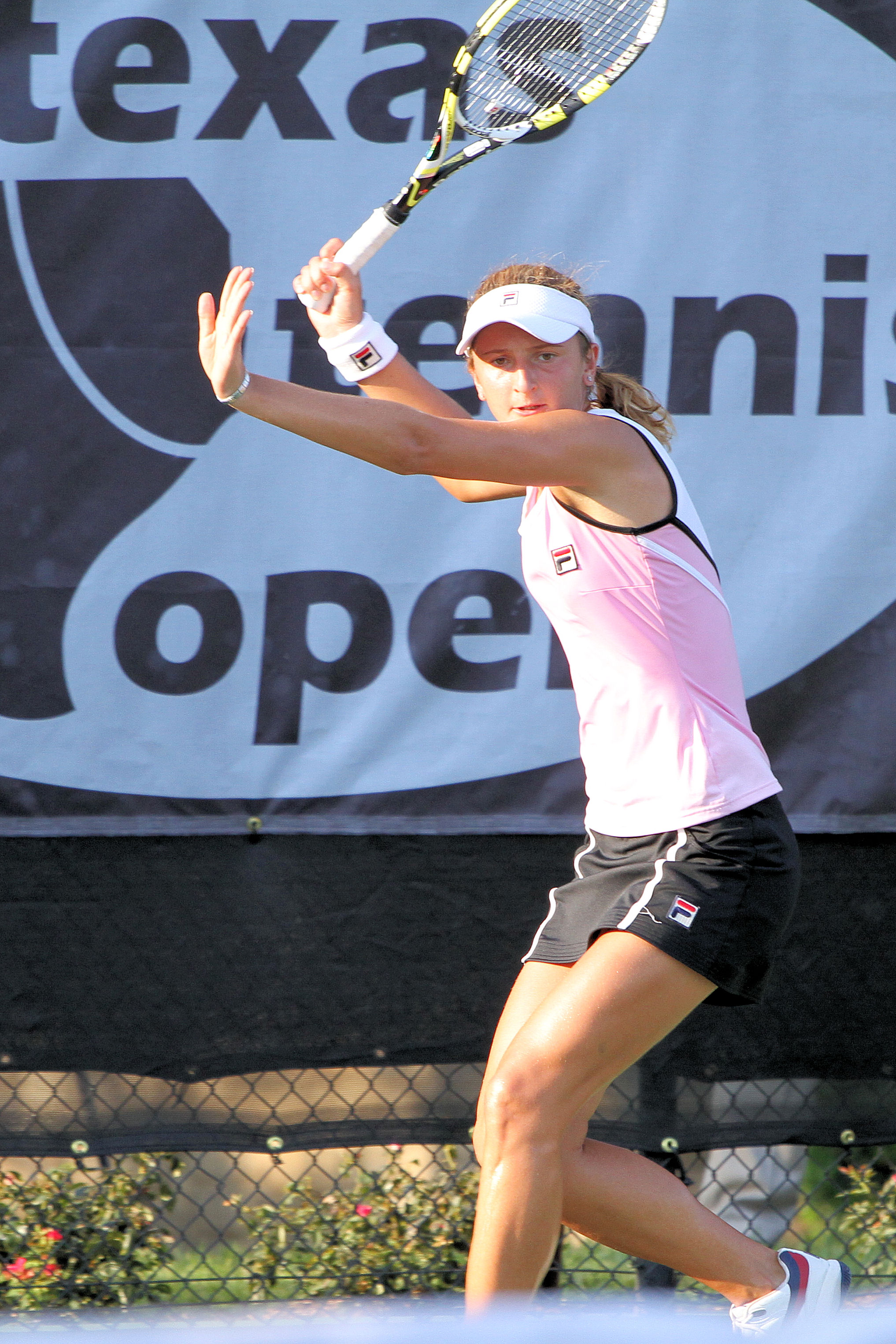 Irina-Camelia Begu (ROM) 2011-08-26 Lisicki def Begu